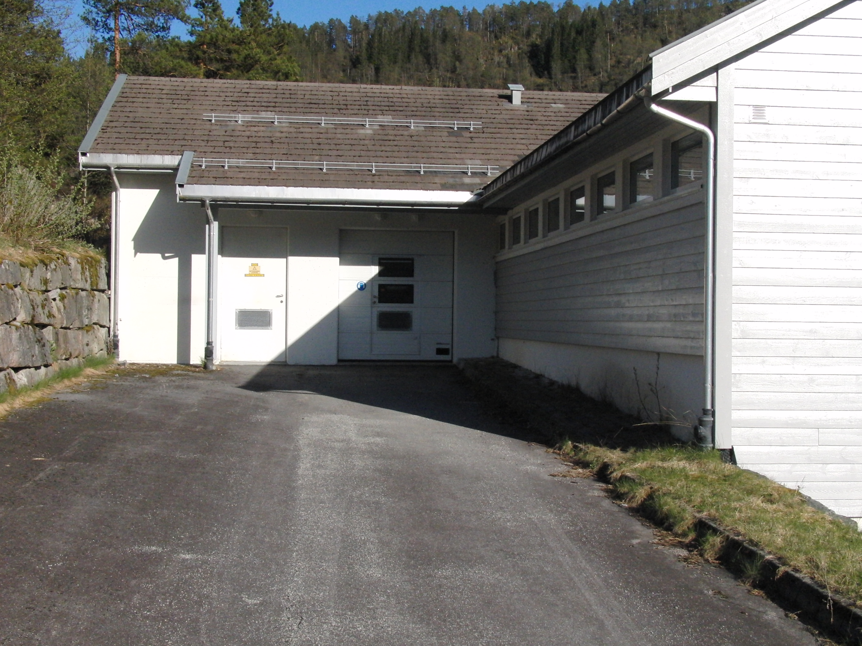 Refsdal kraftverk (Førde)